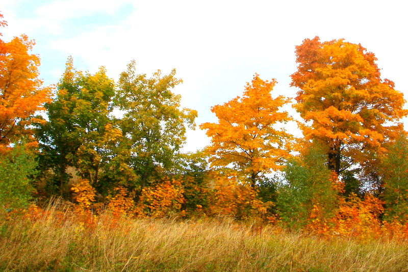 Jesień przy drodze Przedwojów-Kamienna Góra